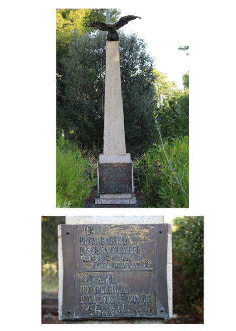 la stele, posta sotto il pennone della Bandiera dell'aeroporto di Boccadifalco, in ricordo dei tenenti pilota Francesco e Giuseppe Notarbartolo, caduti nella prima guerra mondiale